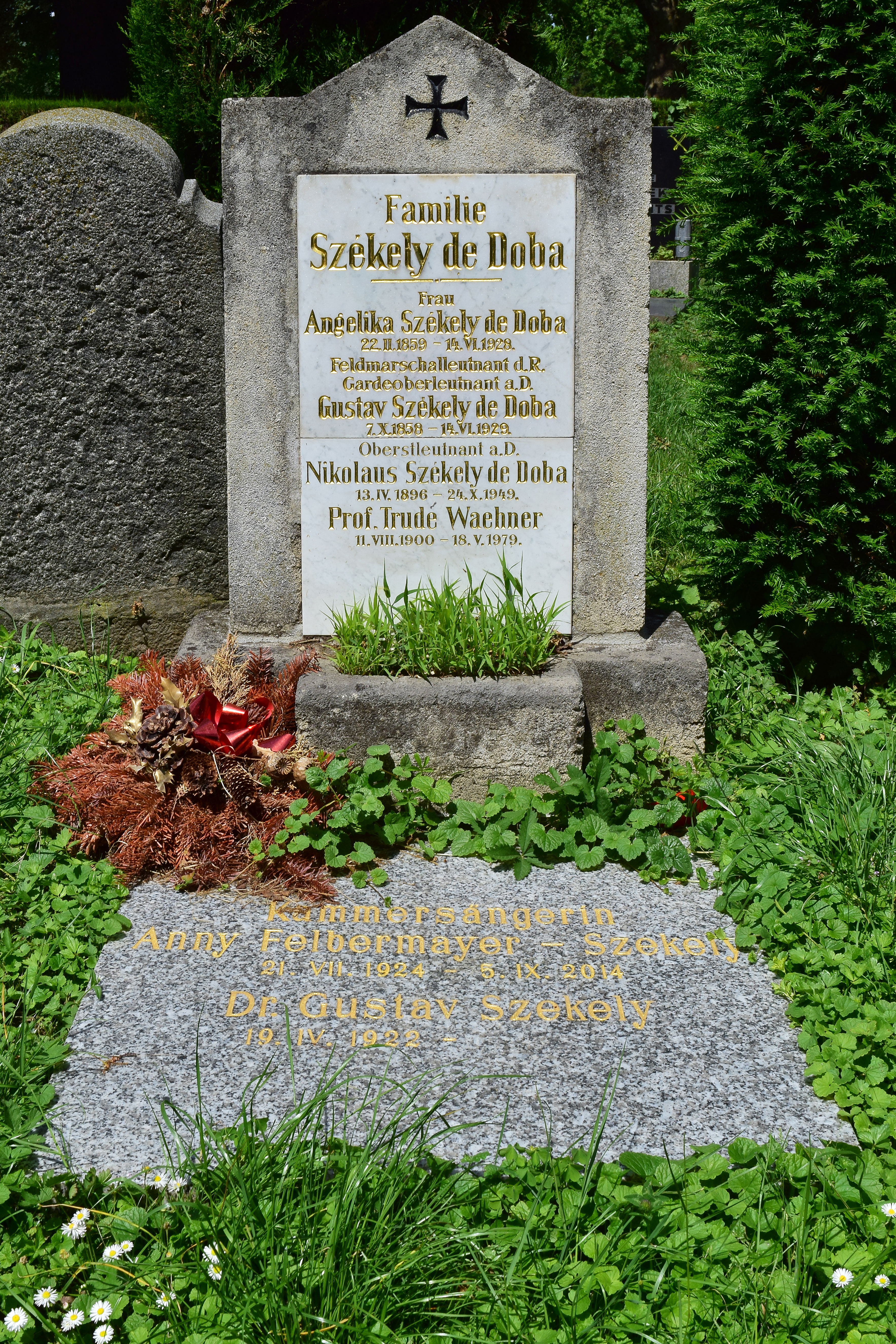 Grab von Trude Waehner und Anny Felbermayer-Szekely auf dem Urnenhain der Feuerhalle Simmering, Abt. 1, Ring 3, Gruppe 2, Nr. 46